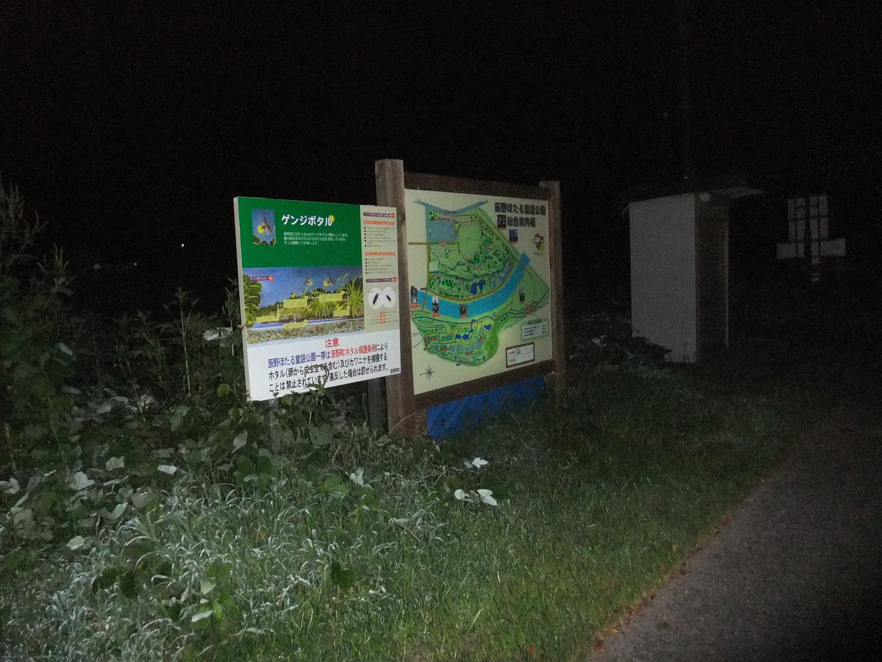 ほたる童謡公園入り口